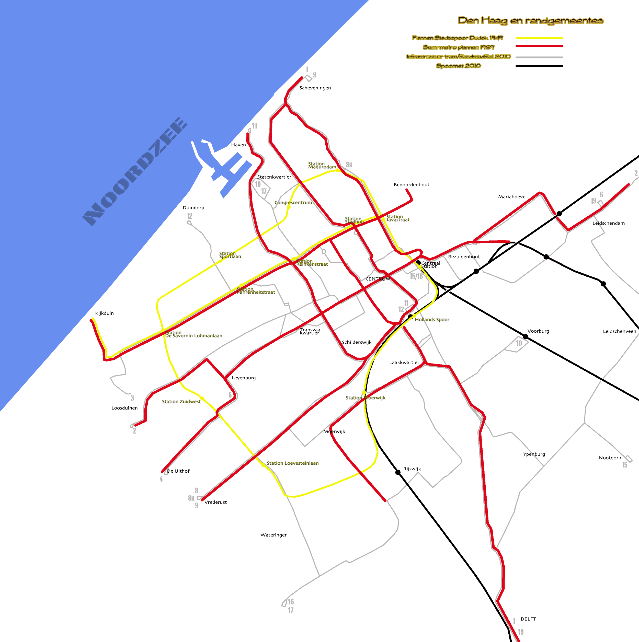 Schematisch overzicht van de Haagse semi-metro plannen